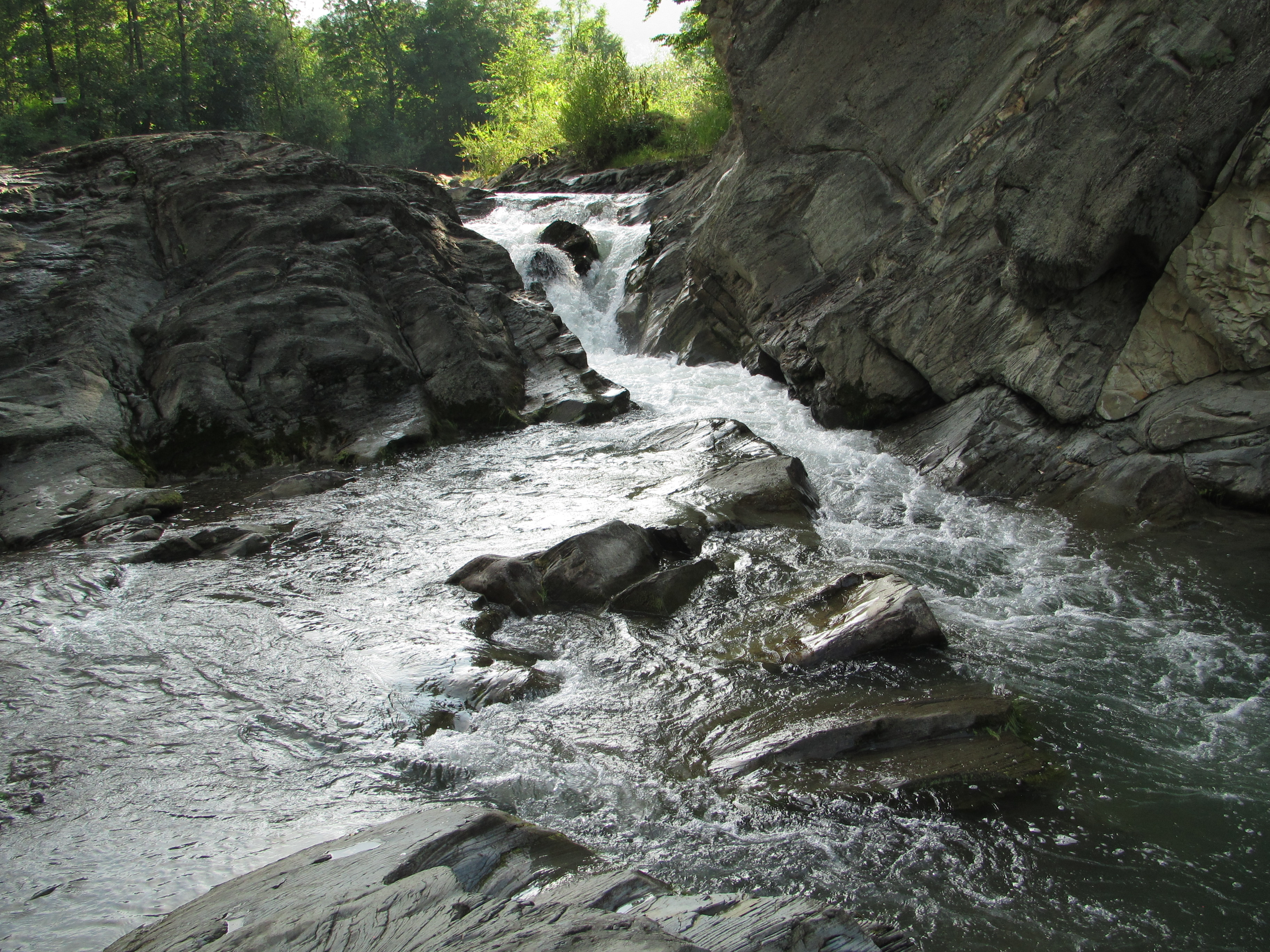 Водоспад Великий Гук в с. Шешори